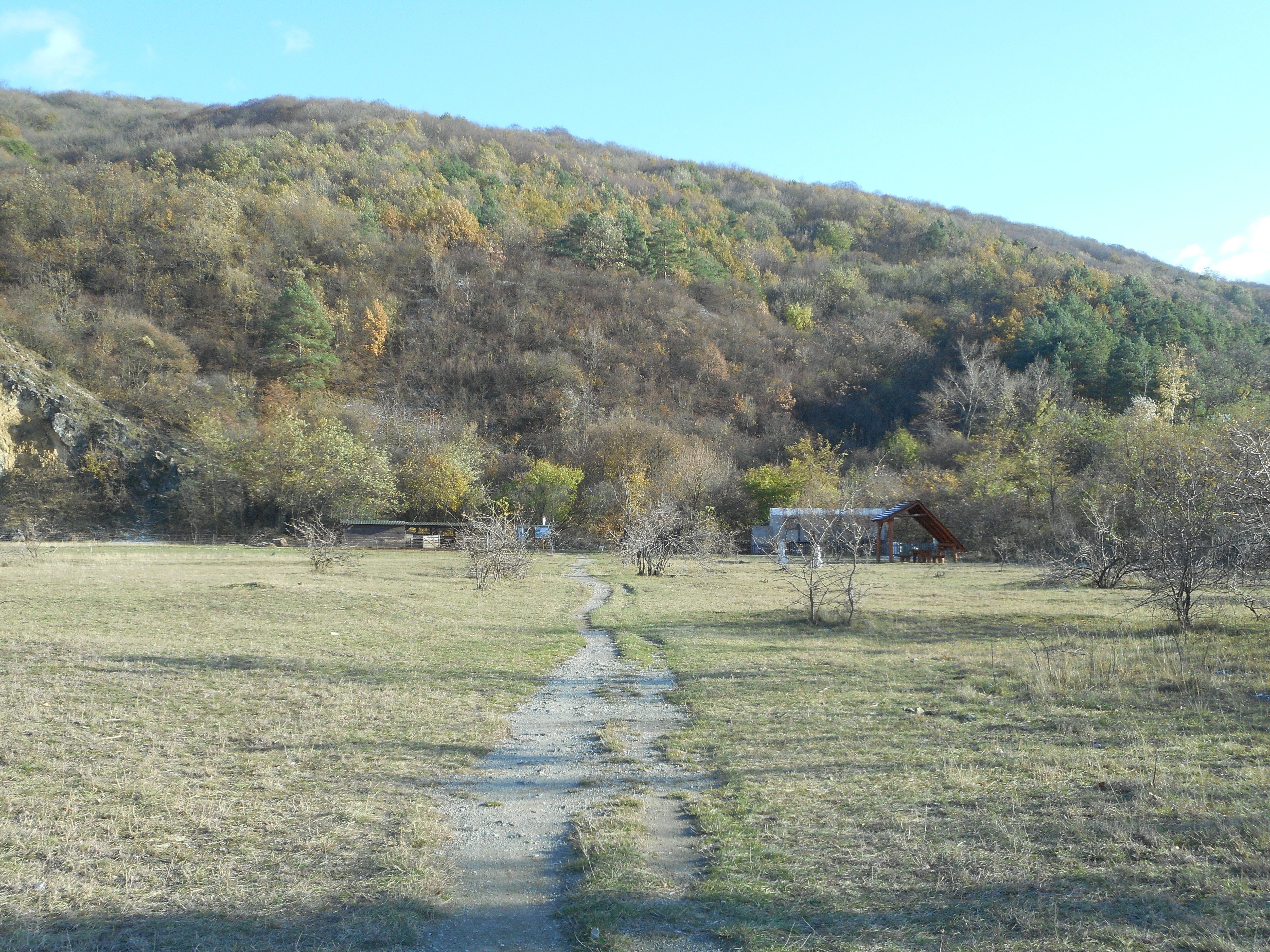 pastva kôz